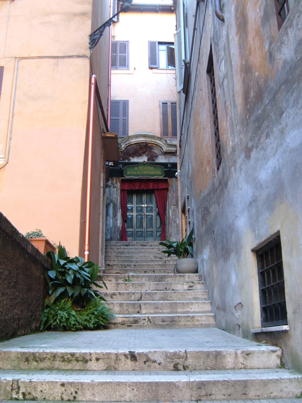 Chiesa sconsacrata dei Santi Simone e Giuda, a Roma, nel rione Ponte.